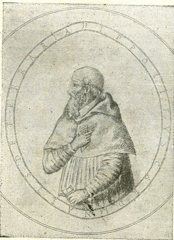 Il cardinale Ippolito II d'Este (1509-1572) in un ritratto dell'epoca disegnato da Giovanni Maria Zappi (1519-1596), da "Annali e Memorie di Tivoli di Giovanni Maria Zappi", a cura di Vincenzo Pacifici, Tivoli, 1920, fig. 2, fuori testo.